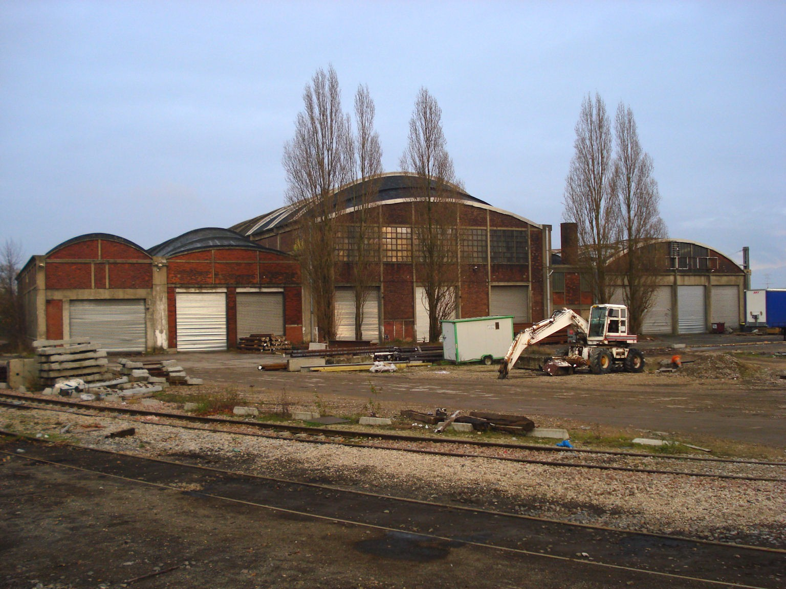 Vue générale de l'atelier et de la remise du dépôt, côté Trappes